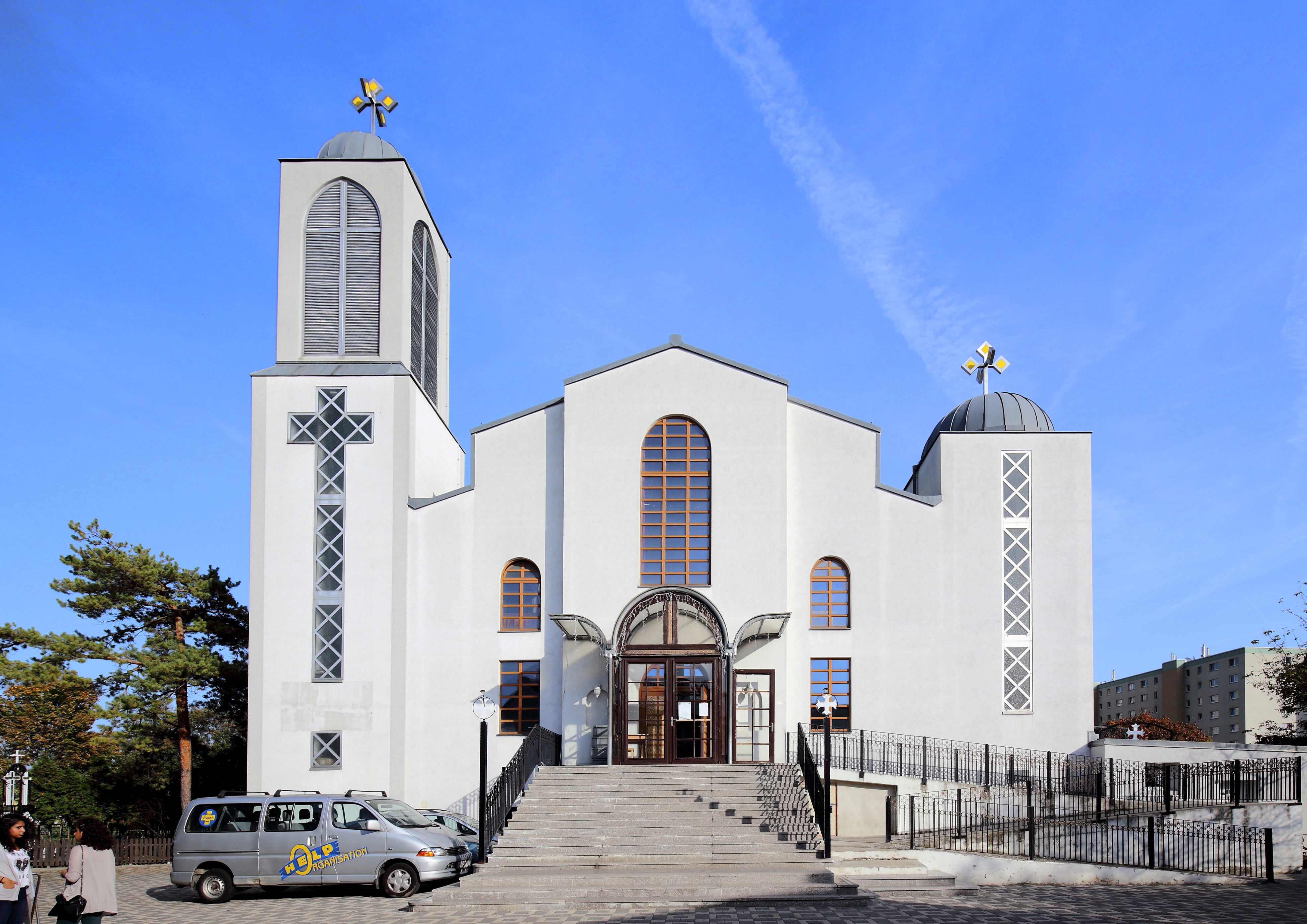 Westansicht der Koptische Kirche der Heiligen Jungfrau von Zeitoun in der österreichischen Bundeshauptstadt Wien. Sie ist die Bischofskirche des koptischen Bistums für Österreich und die deutschsprachige Schweiz und wurde Ende der 1990er Jahre / Anfang der 2000er Jahre errichtet.